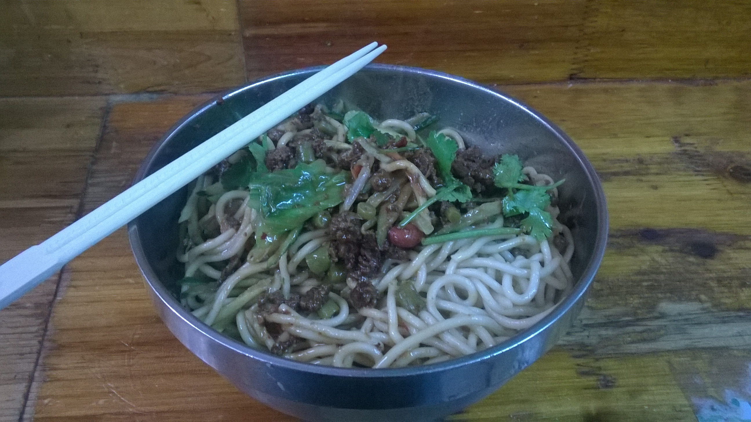 吴语: 热干面 口味浓重 老刺激人个身体